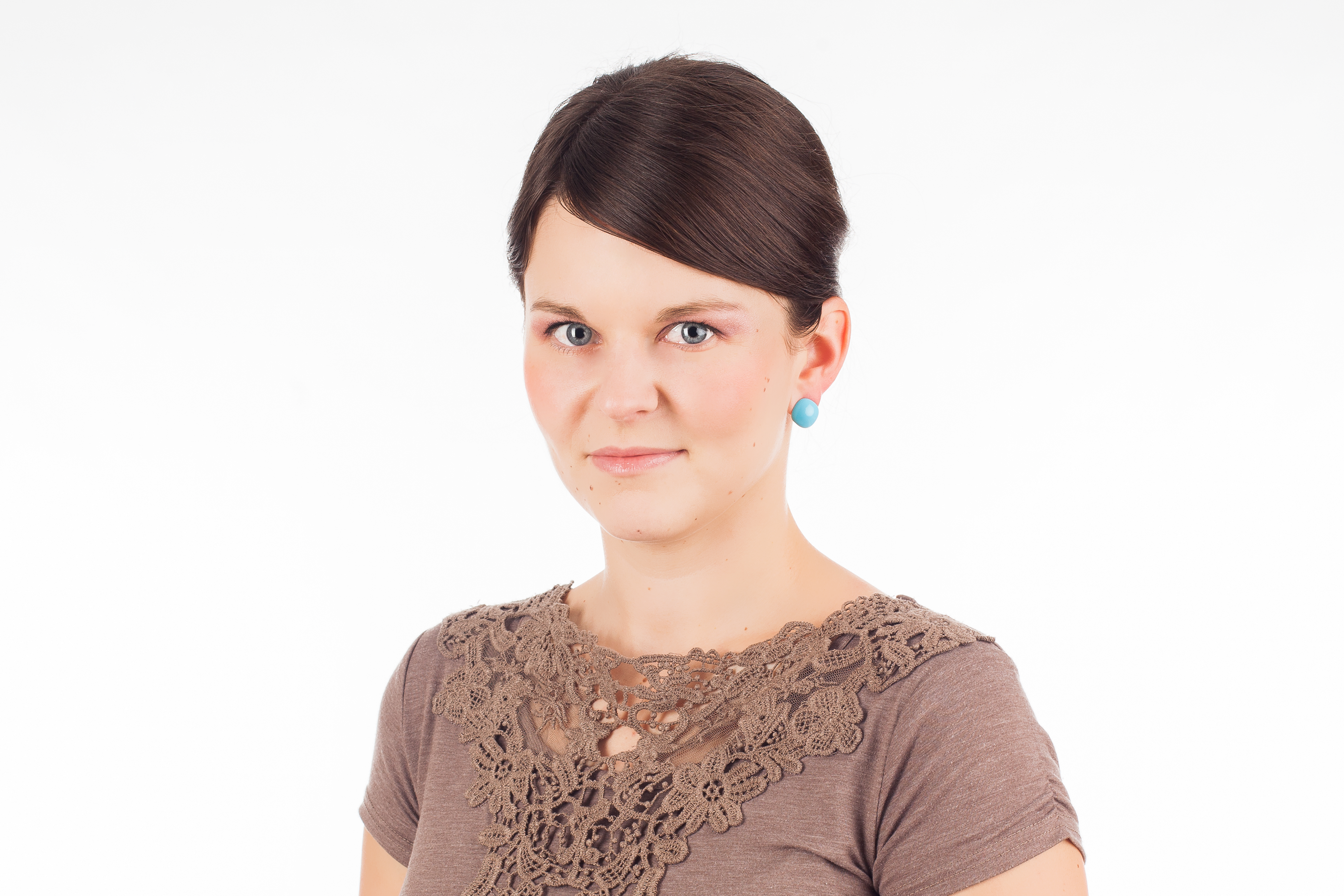 Heilika Pikkov